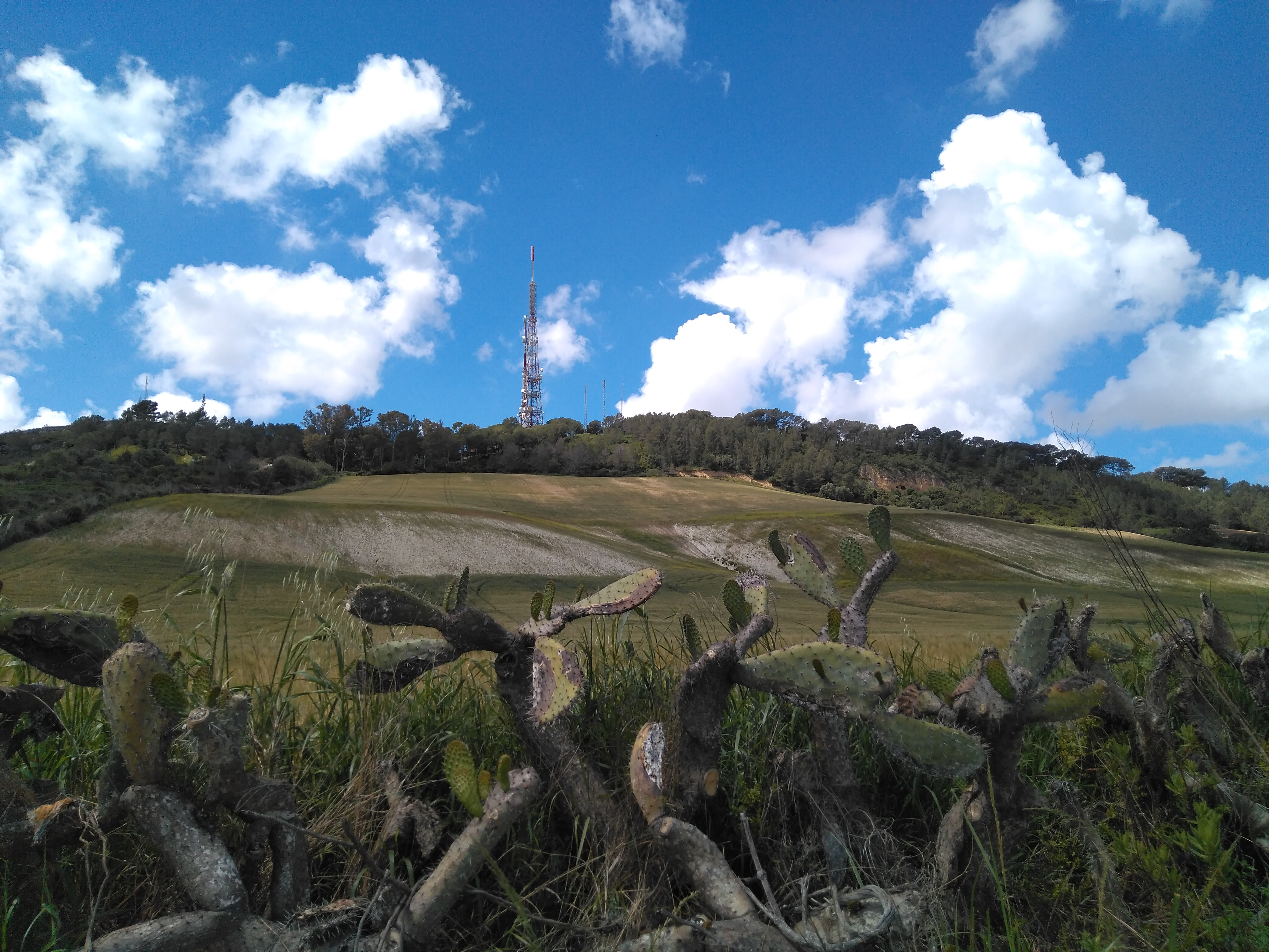 sierra de San Cristóbal desde Jerez